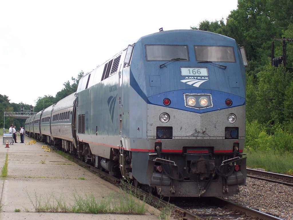 Amtrak train 69 at Saratoga Springs station.